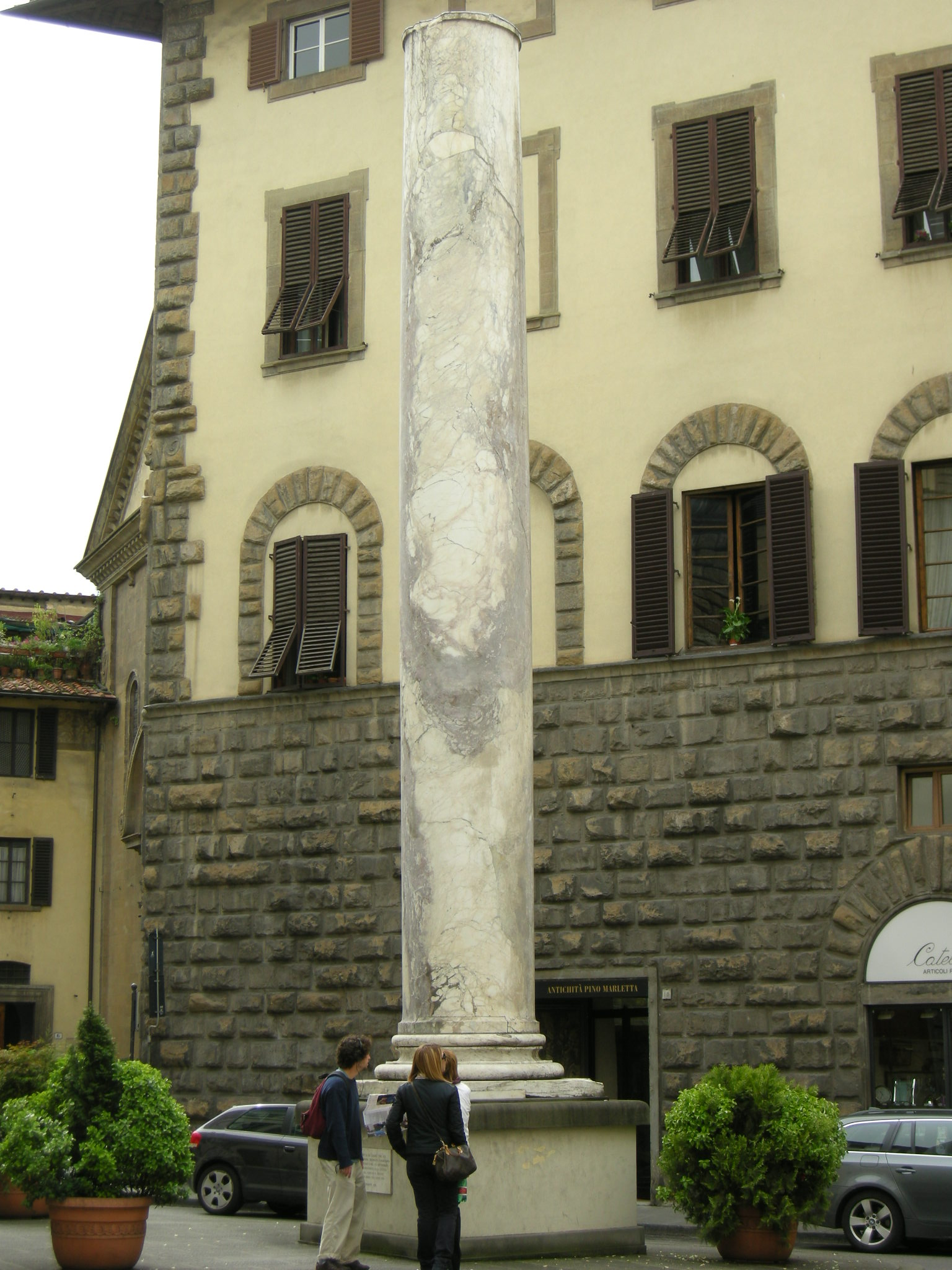 Colonna di san felice